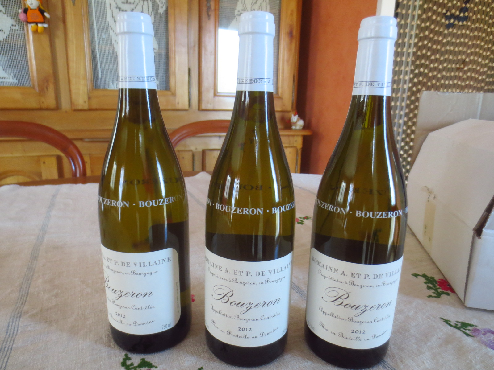 Trois bouteilles d'aligoté Bouzeron AOC 2012 du domaine Aubert de Villaine à Bouzeron